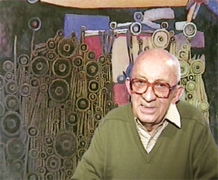 Portrait de Pierre Courtin